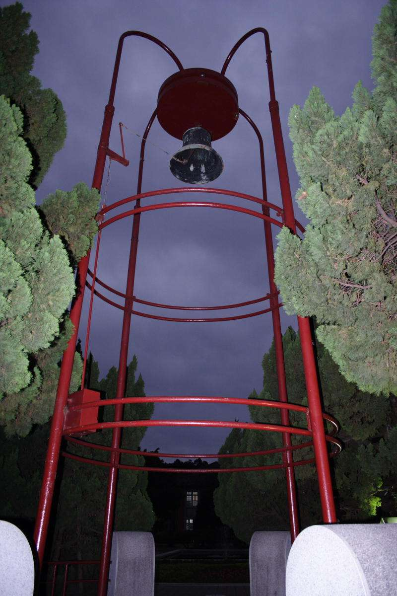 台湾大学のシンボル、傅鐘（鐘）中文（台灣）: 夜間臺灣大學的傅鐘。